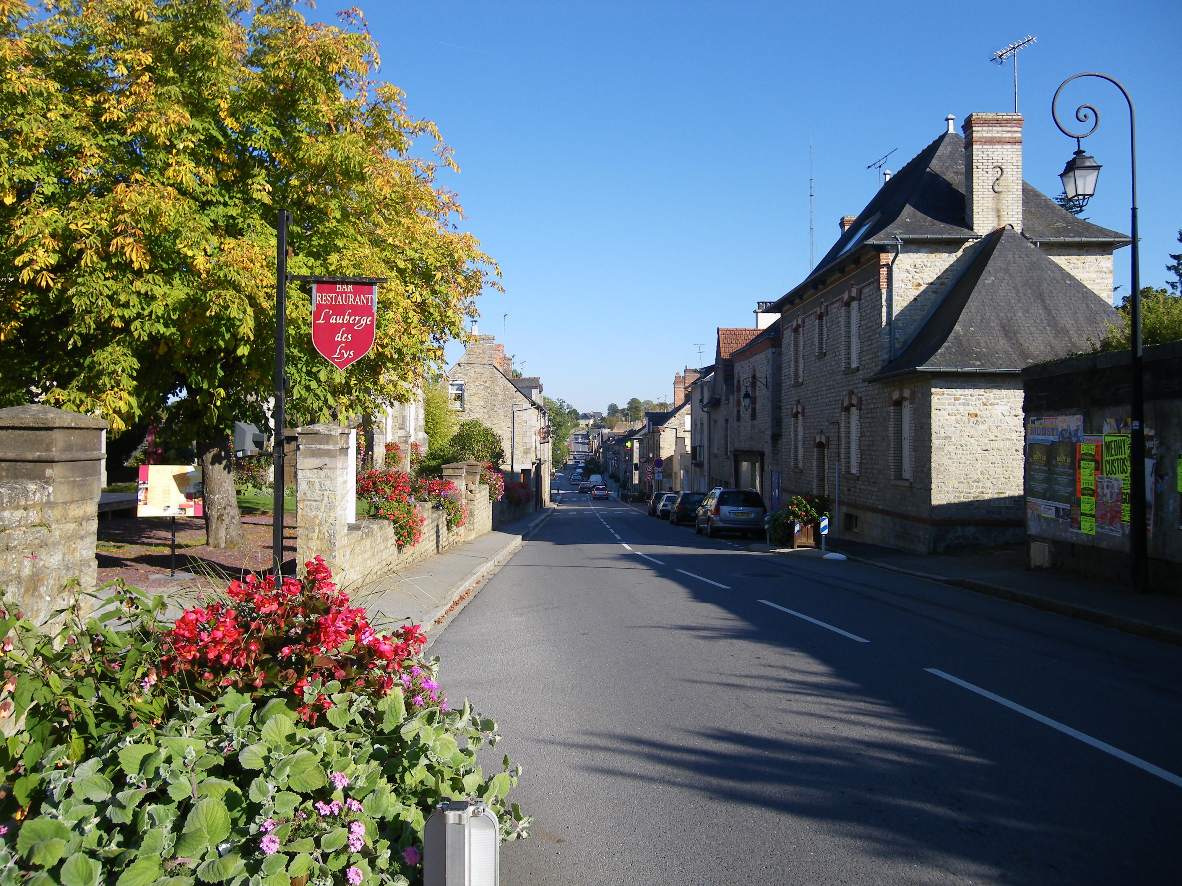 rue a val d'izé